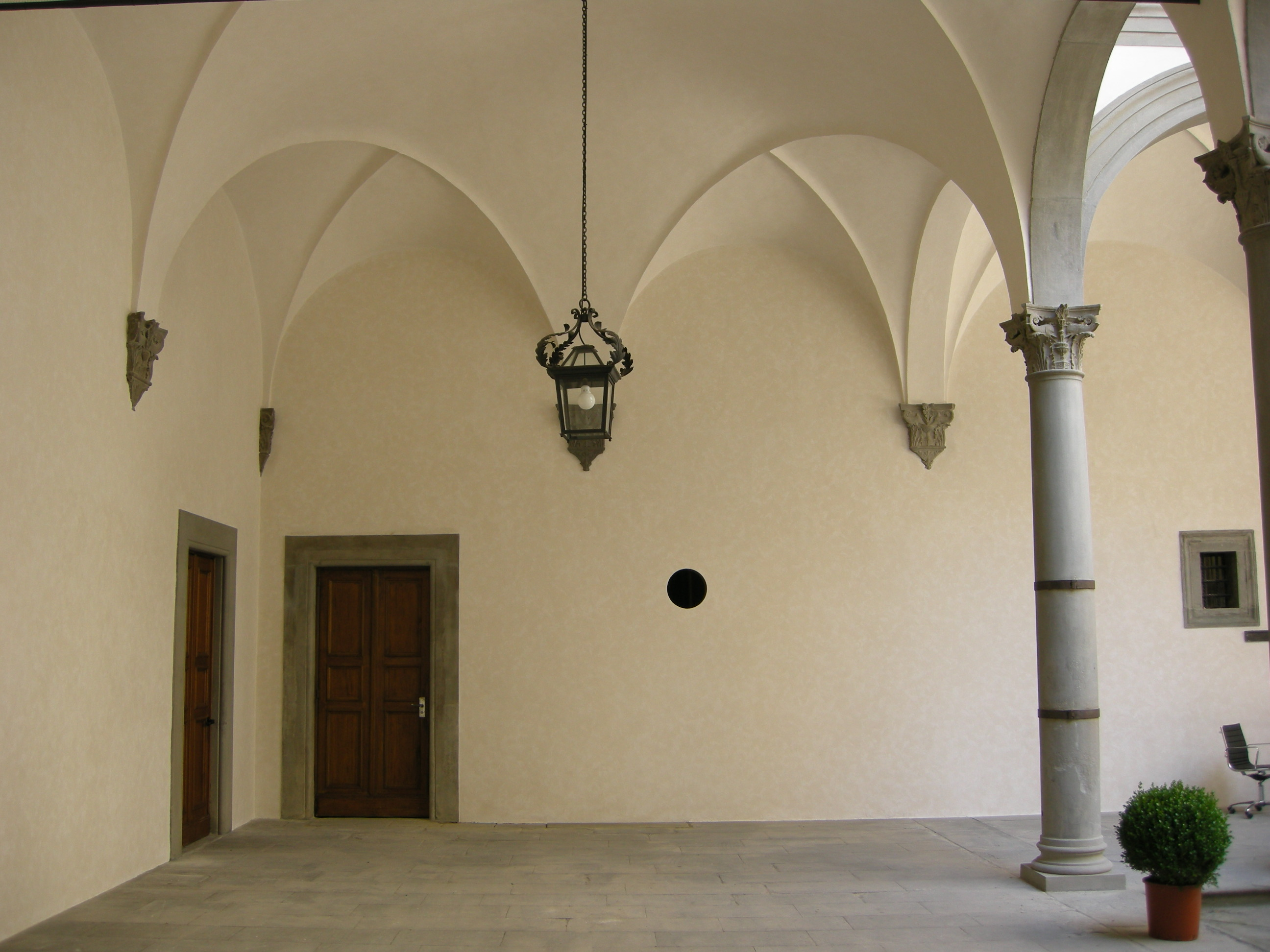 Palazzo pazzi, cortile 05